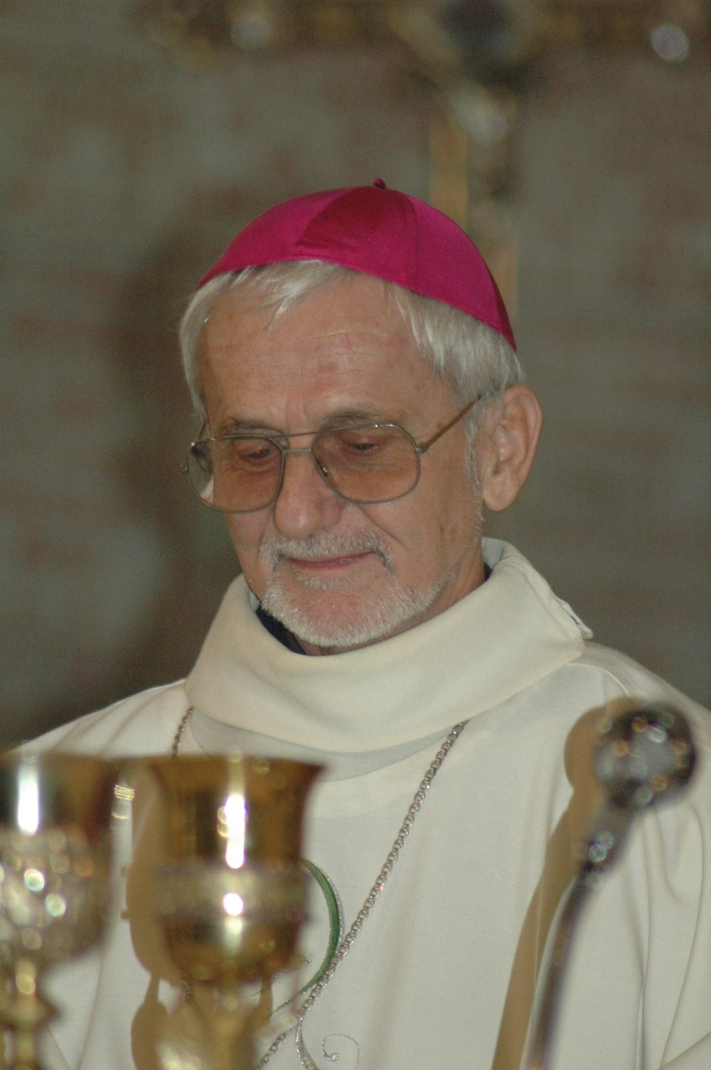 Mgr Claude Rault, évêque catholique français de Laghouat en Algérie